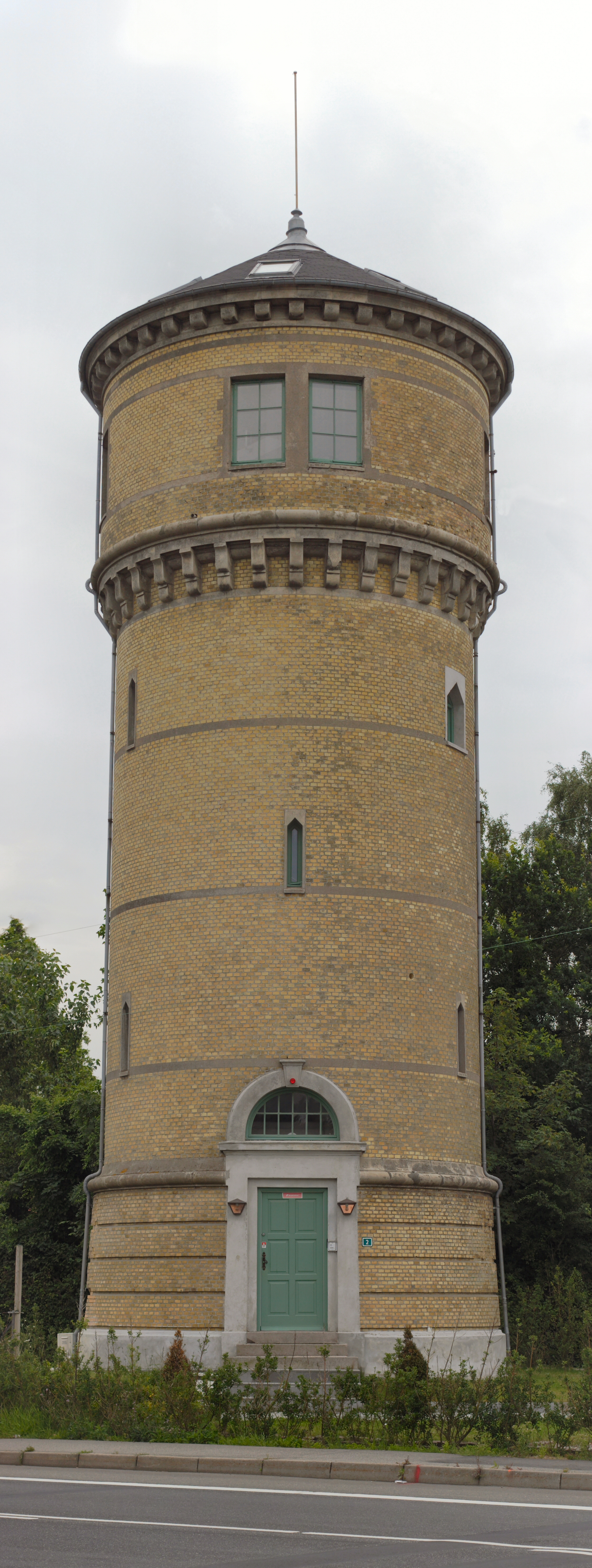 Middelfart Vandtårn